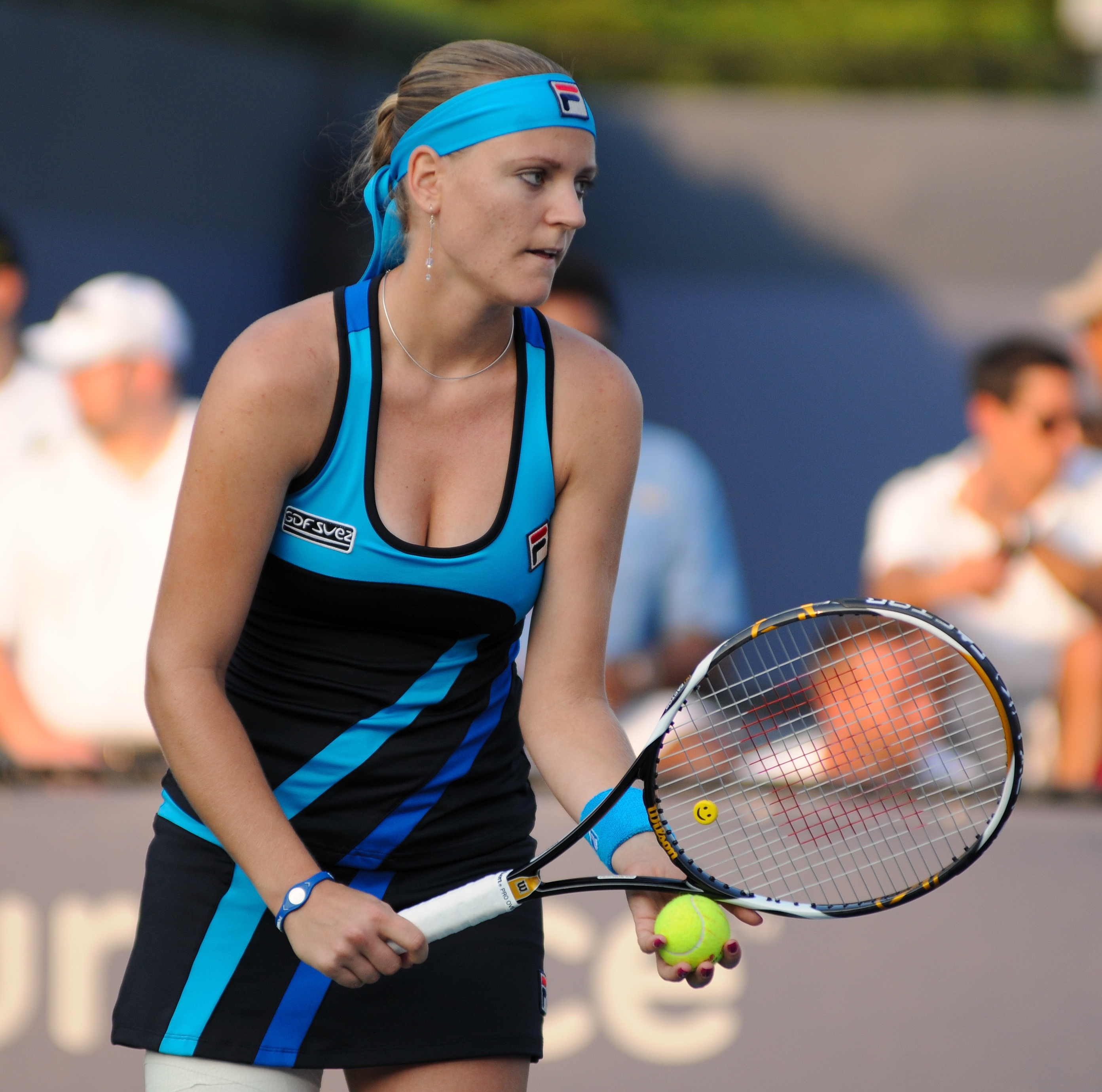 Agnes Szavay - US Open 2010